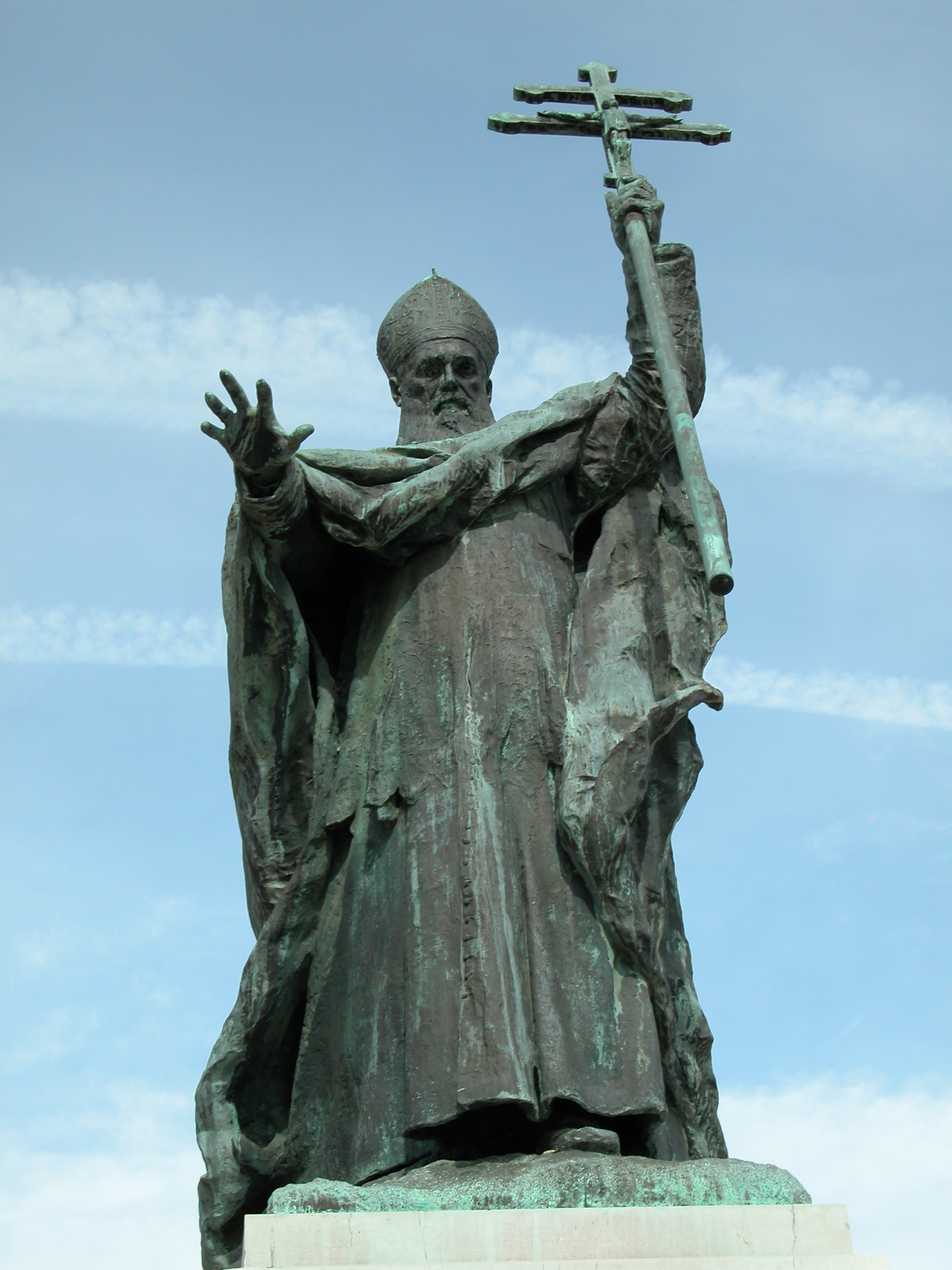 Statue du Cardinal Lavigerie à Bayonne par Alexandre Falguière